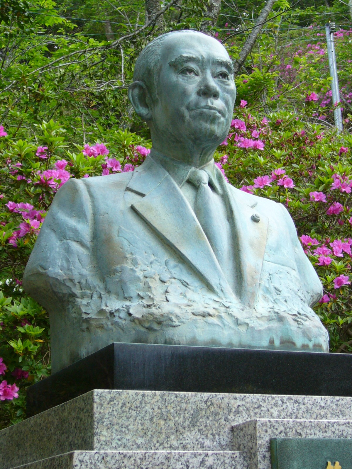 yamamura shinjiro(katori-shrine),katori-city,japan.JPG